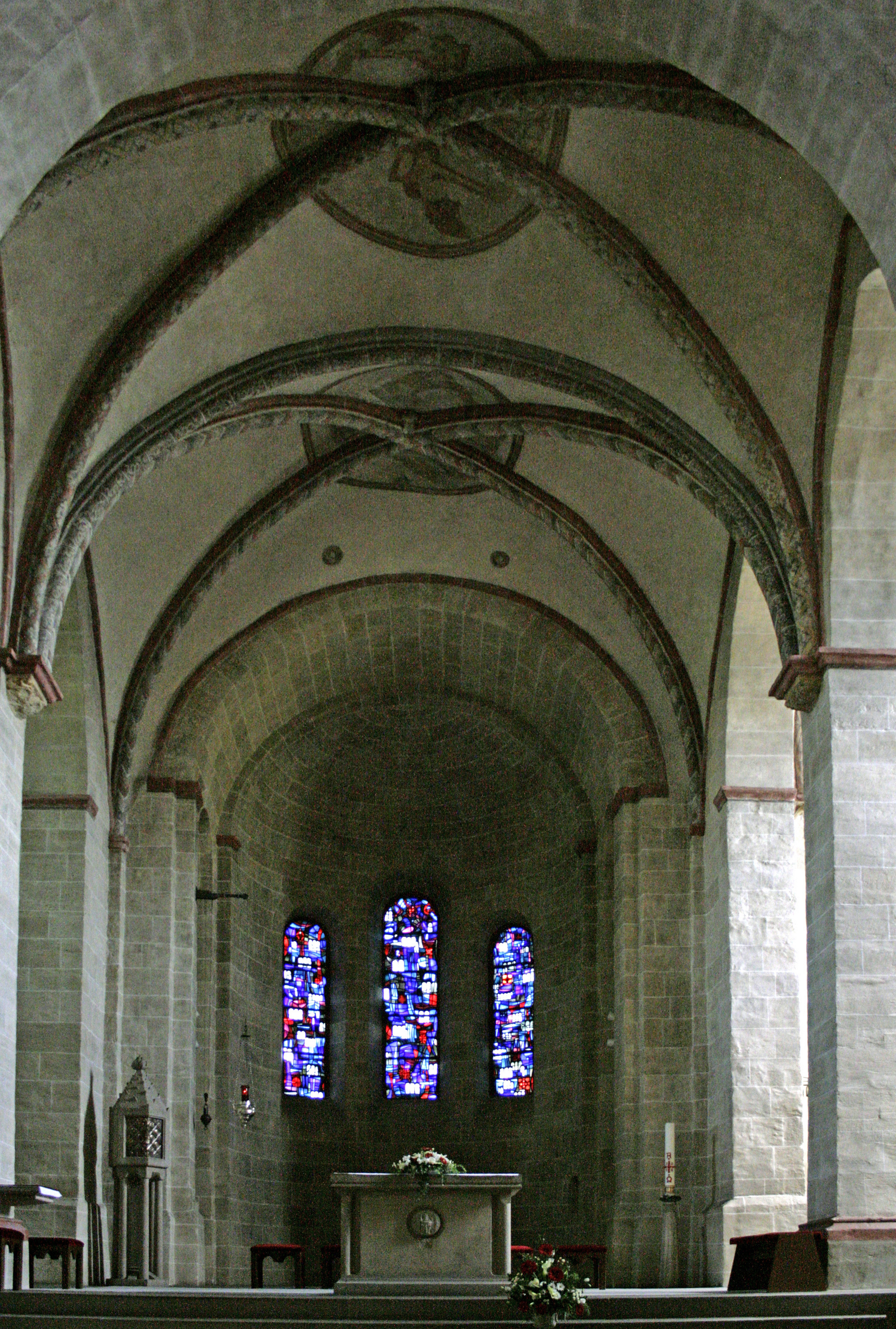 Lubentiusstift Dietkirchen, Deutschland, Blick durch den Kirchenraum auf den Altar